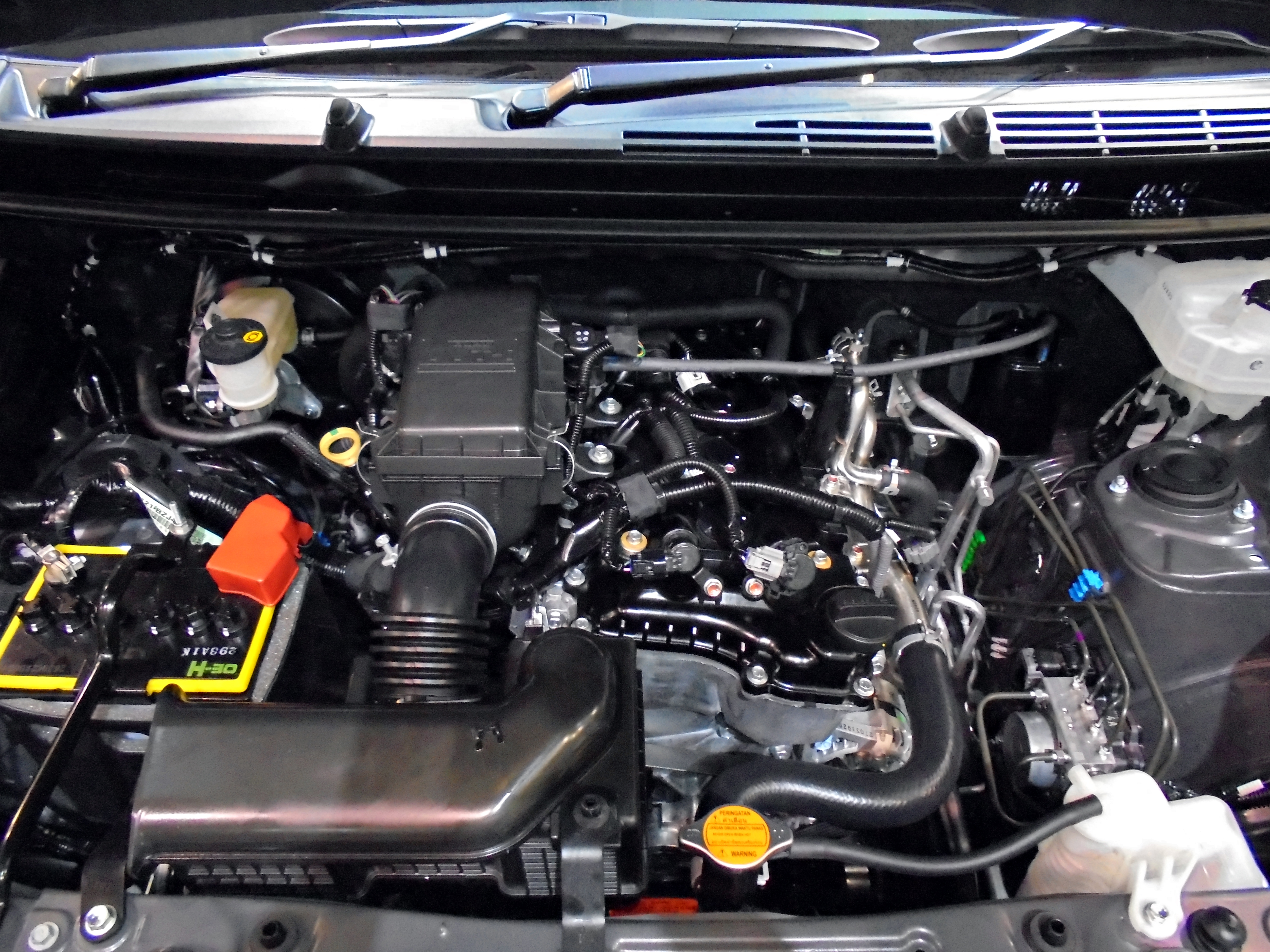 トヨタ・ラッシュ 2NR-VE エンジン